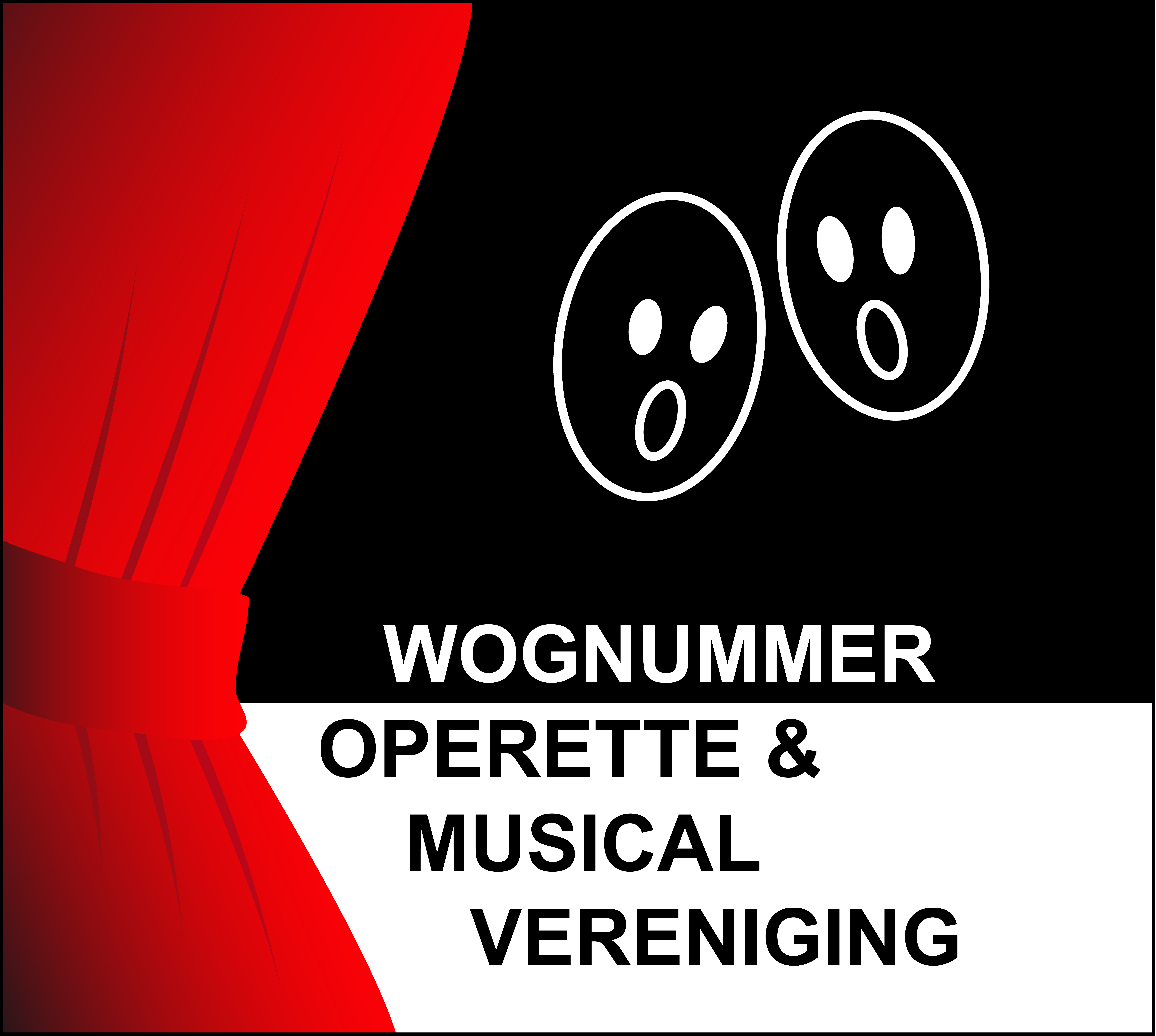 gemaakt door Mijn moeder en mij voor de Wognummer Operette- en Musical Vereniging.